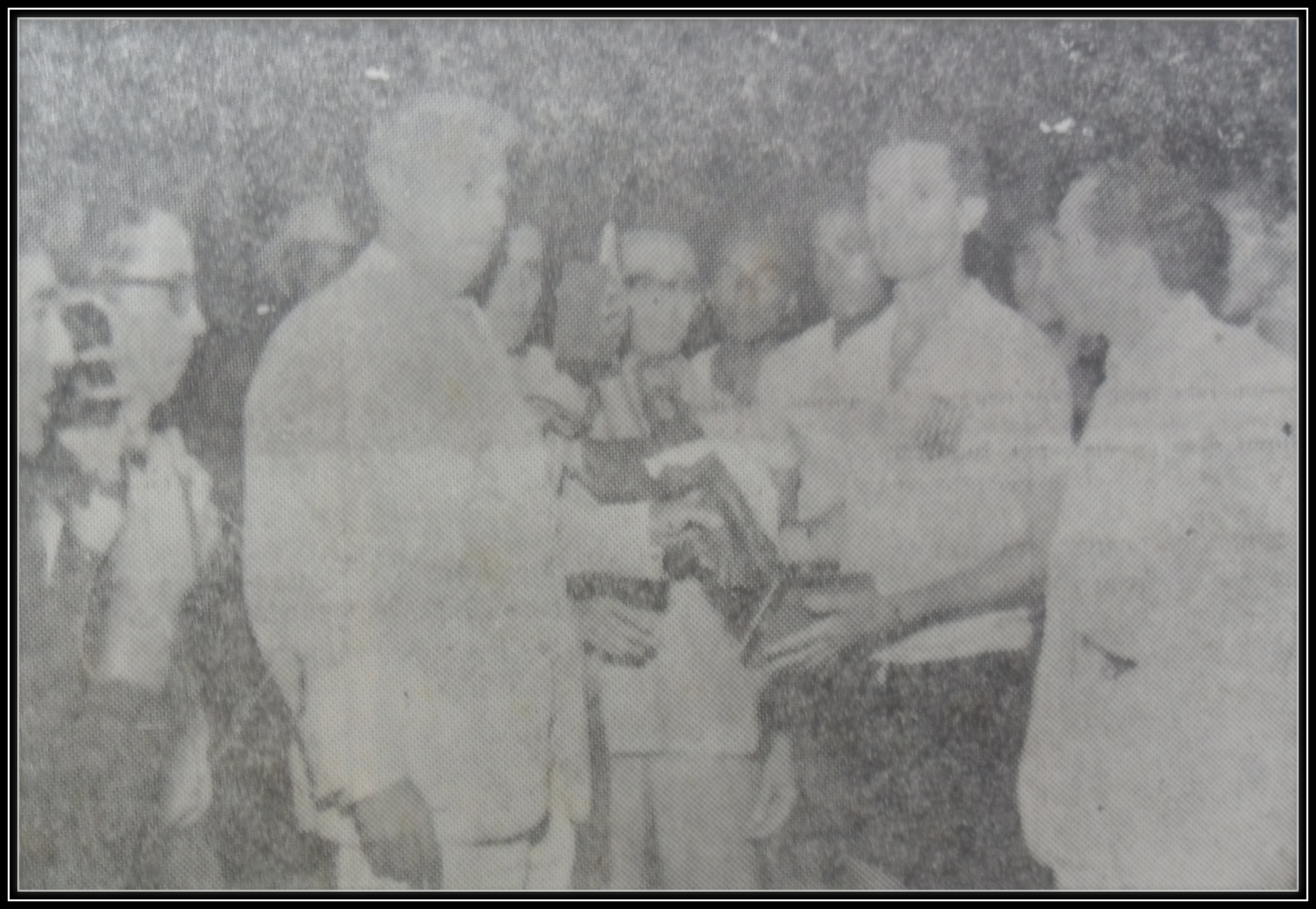 Entrega da Taça do Torneio Regional Gercino Tabosa.